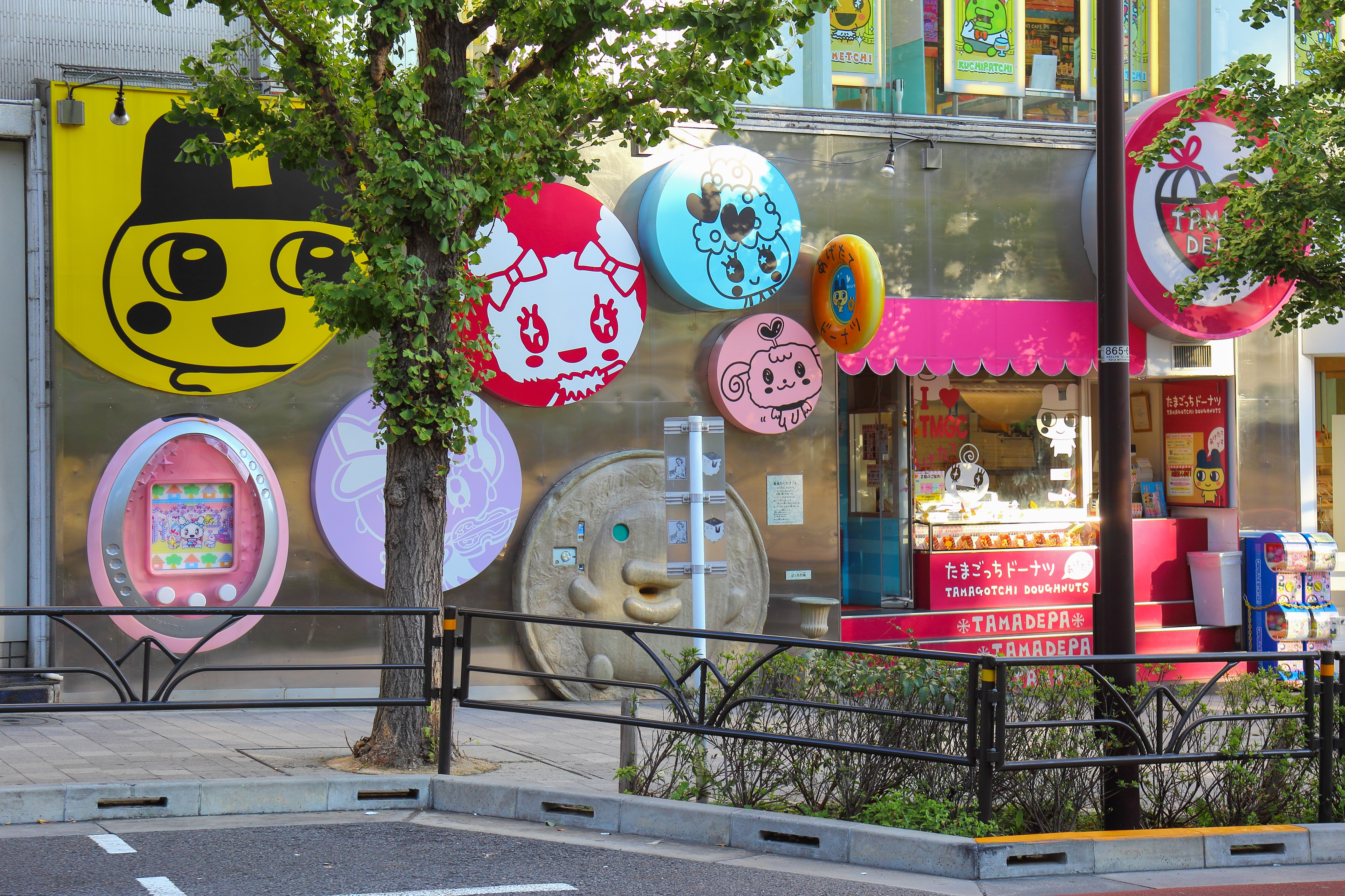 たまごっちデパート原宿店。はらじゅくアッシュビル。2012年。